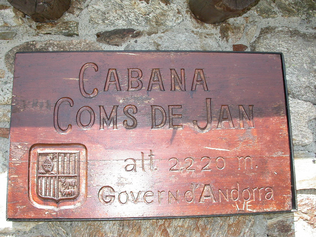 Refuges Andorre